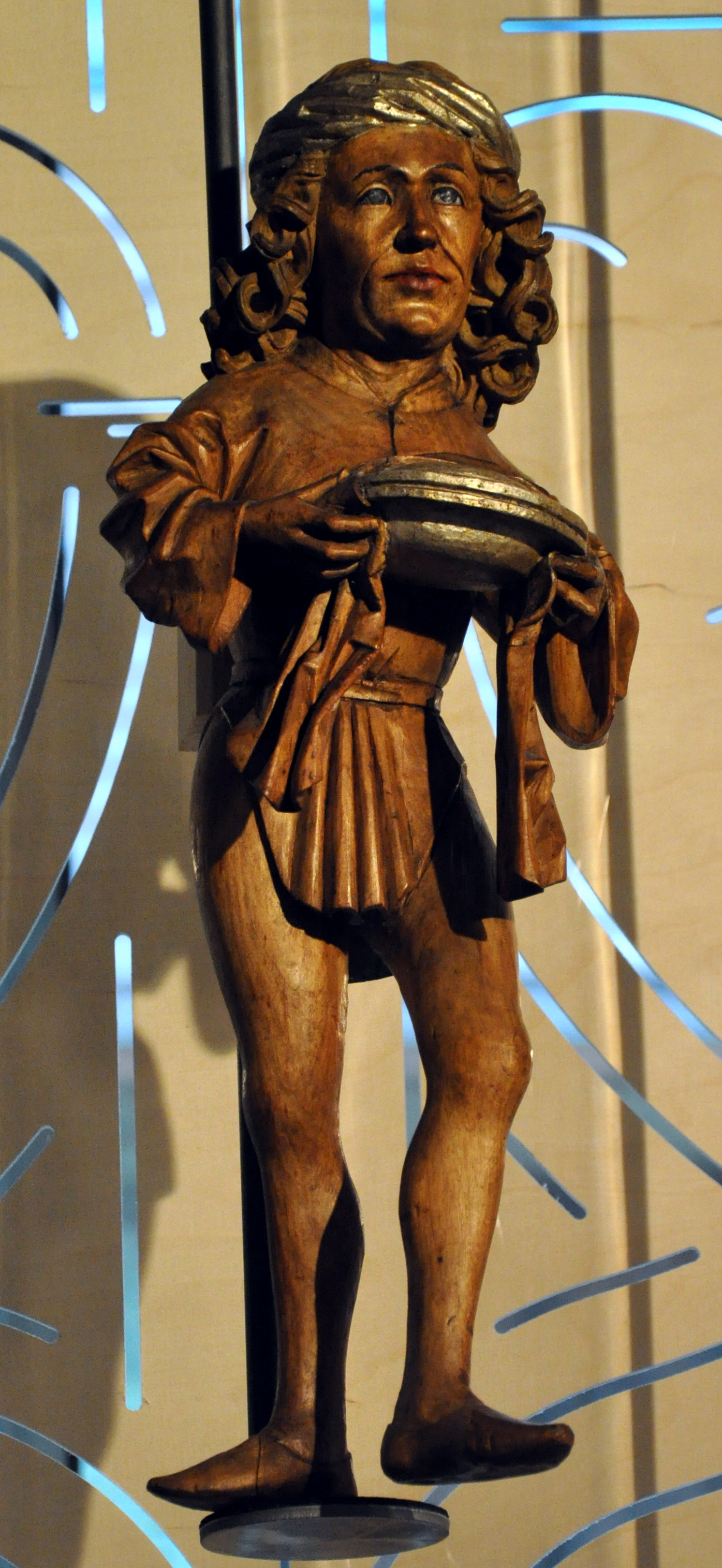 Jacob Russ: Pfalzgraf bei Rhein; Teil der Darstellung des Quaternionen des Hl. Römischen Reichs im Rathaussaal in Überlingen (fotografiert in der Ausstellung "Jacob Russ" im Museum Humpis-Quartier Ravensburg)